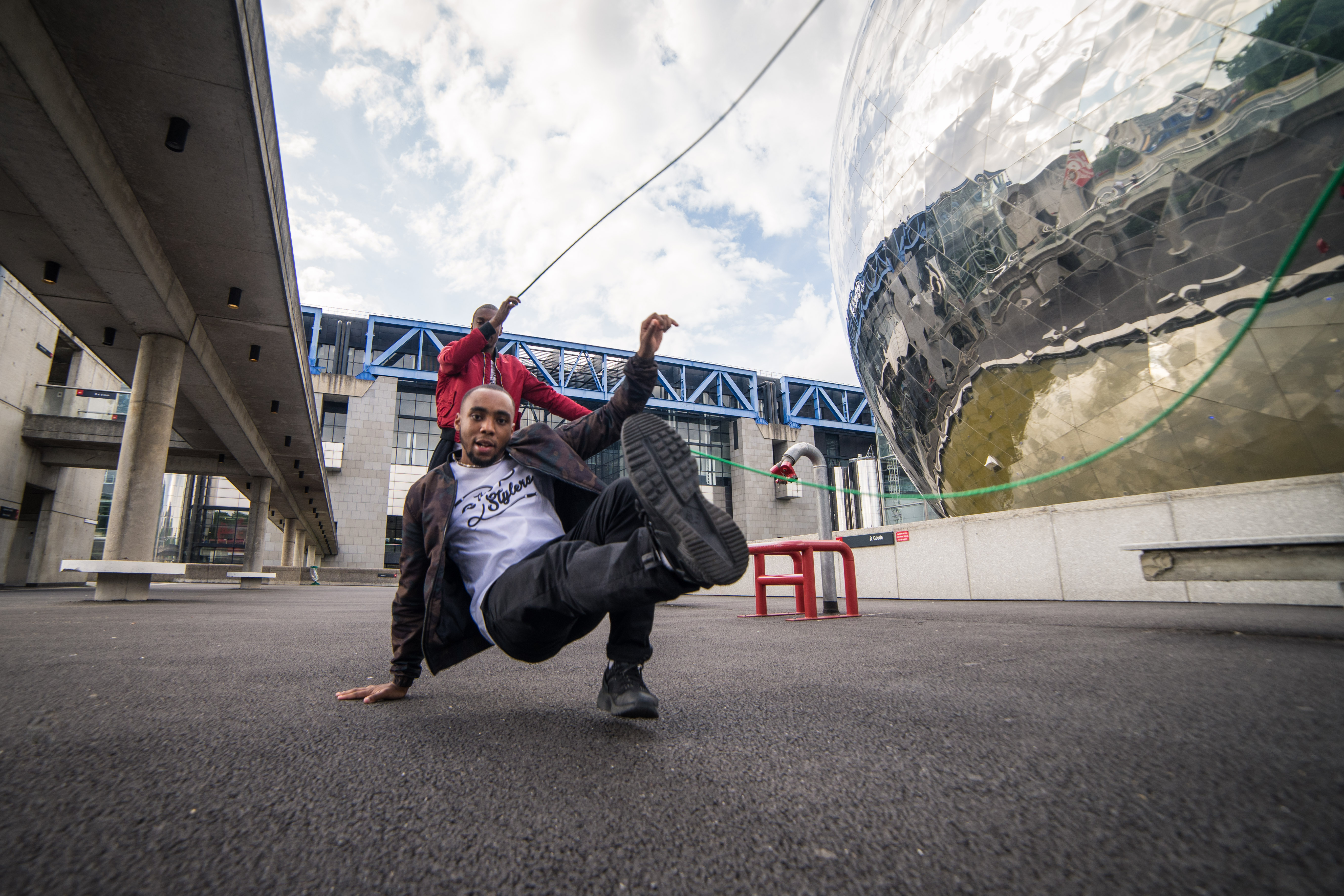 Photo de Double Dutch de The Ropestylers prise par le photographe Adrien Plaud